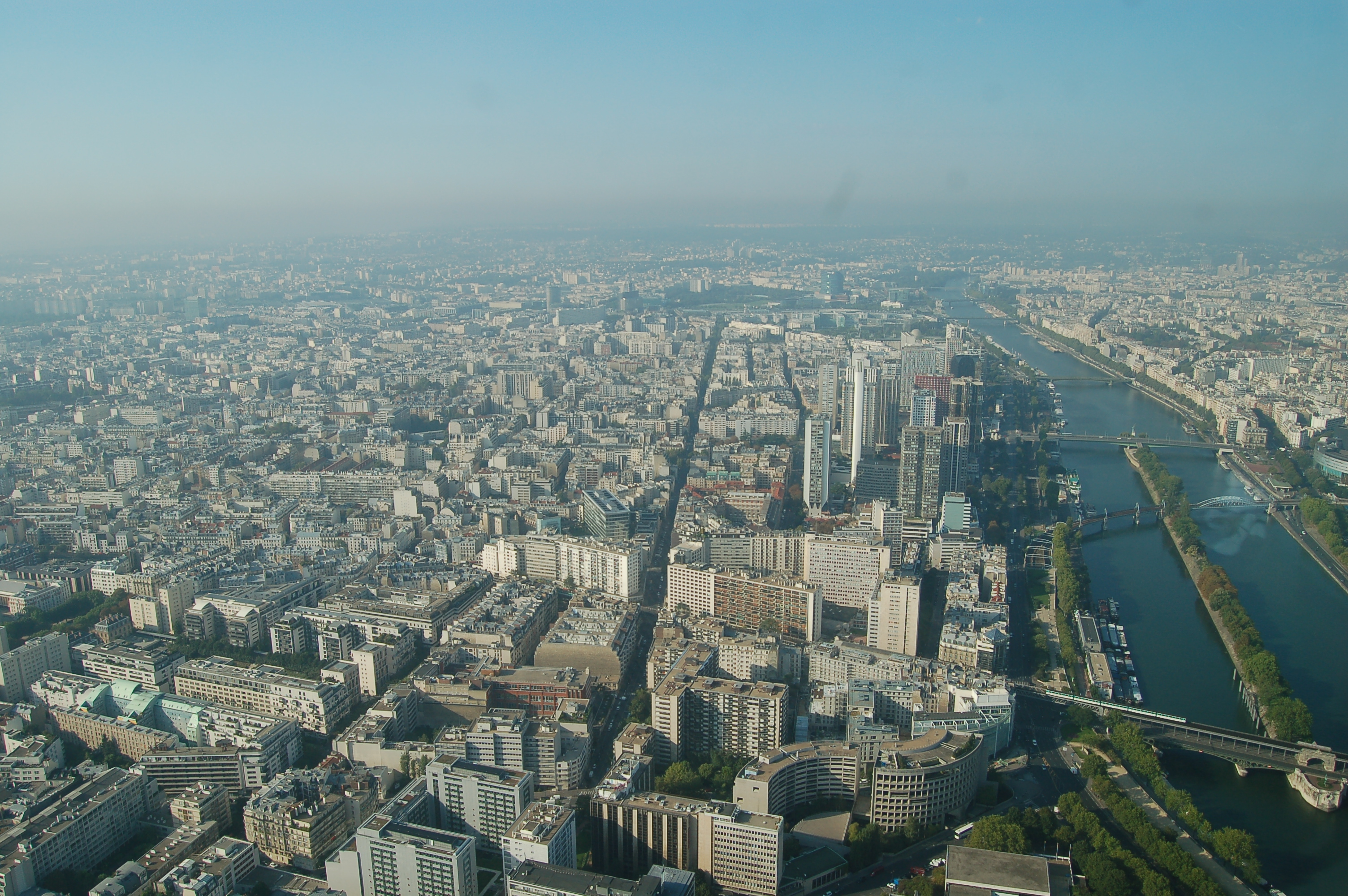 Front de Seine & La Seine avec Ile aux Cygnes à Paris